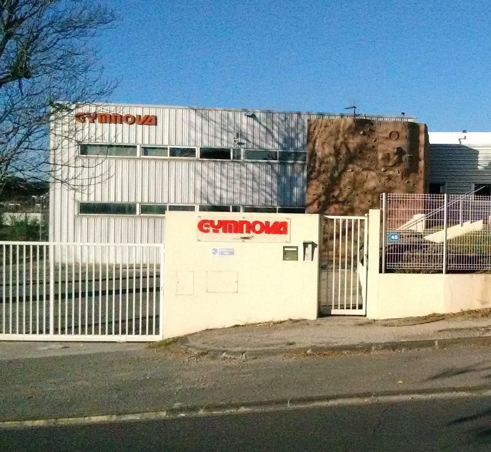 Siege social Gymnova Marseille